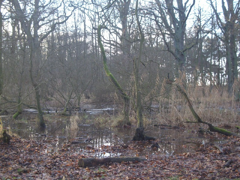 Naturschutzgebiet Lanken. Ostteil. Blick von Station G des Lehrpfades (Reich der Esche).